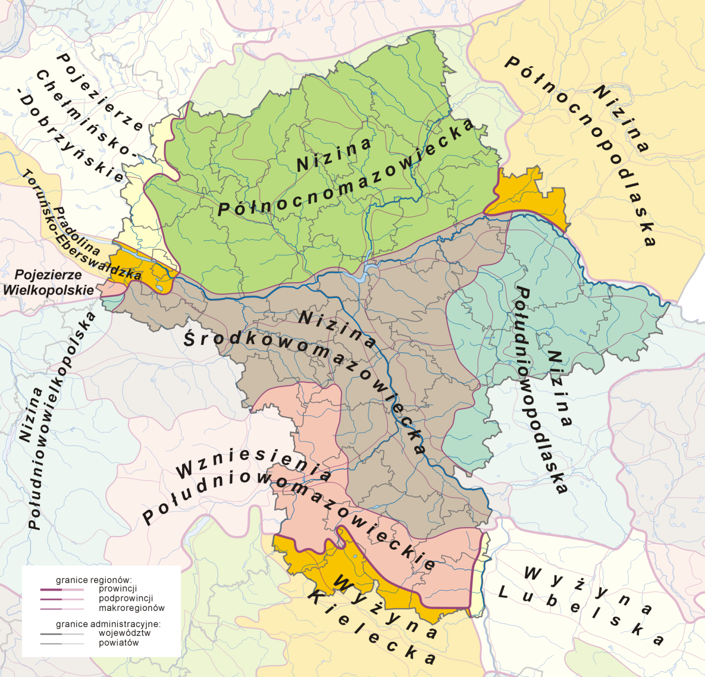 Mapa przedstawiająca makroregiony fizycznogeograficzne województwa mazowieckiego